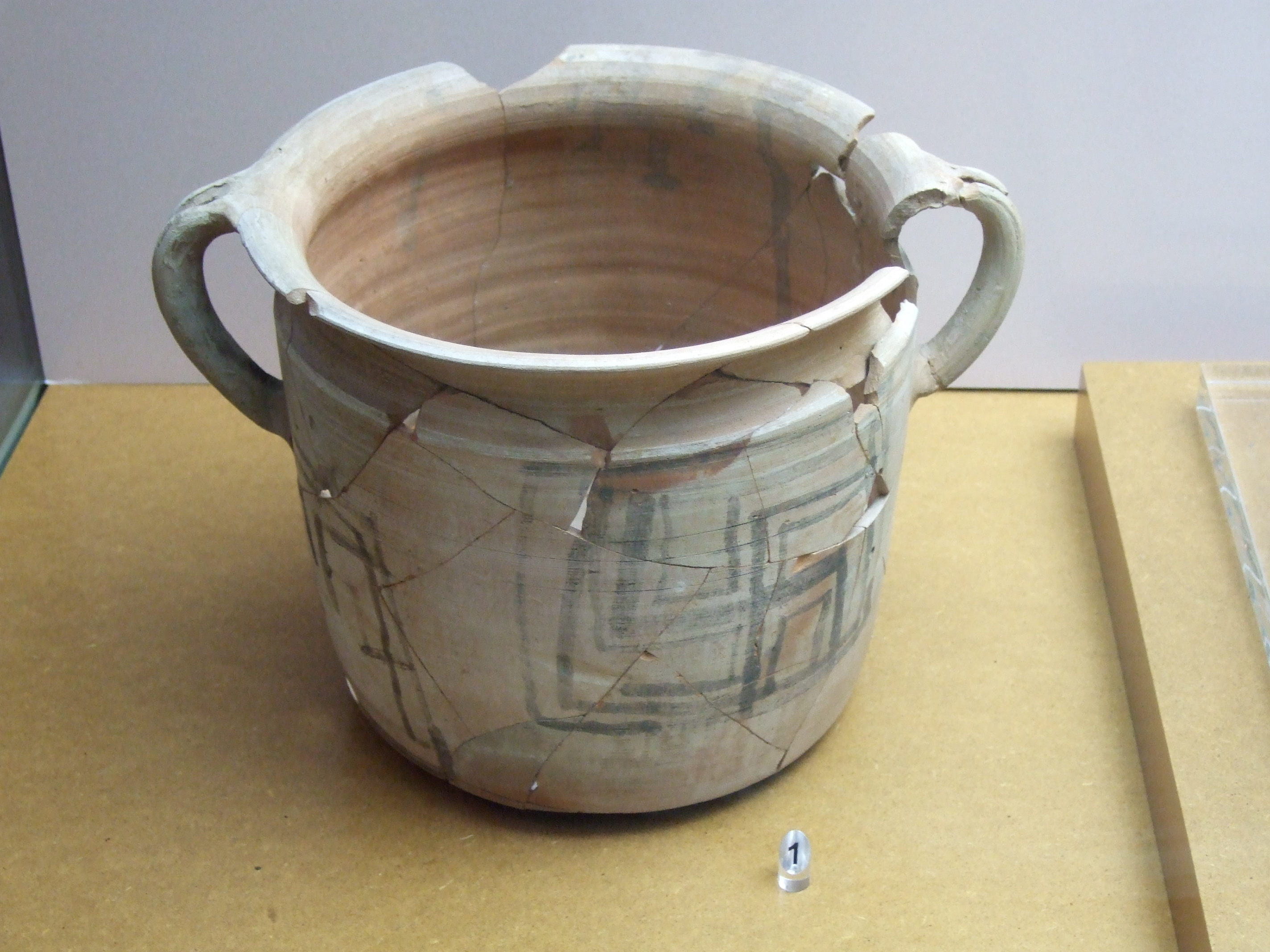 Vasila cilíndrica con decoración de motivos solares, Los Castellares (Herrera de los Navarros, Zaragoza). Siglo II adC. Museo de Zaragoza